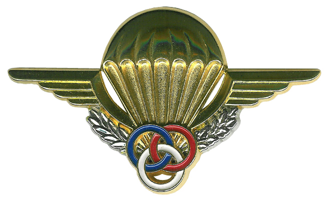 insigne d'instructeur parachutiste